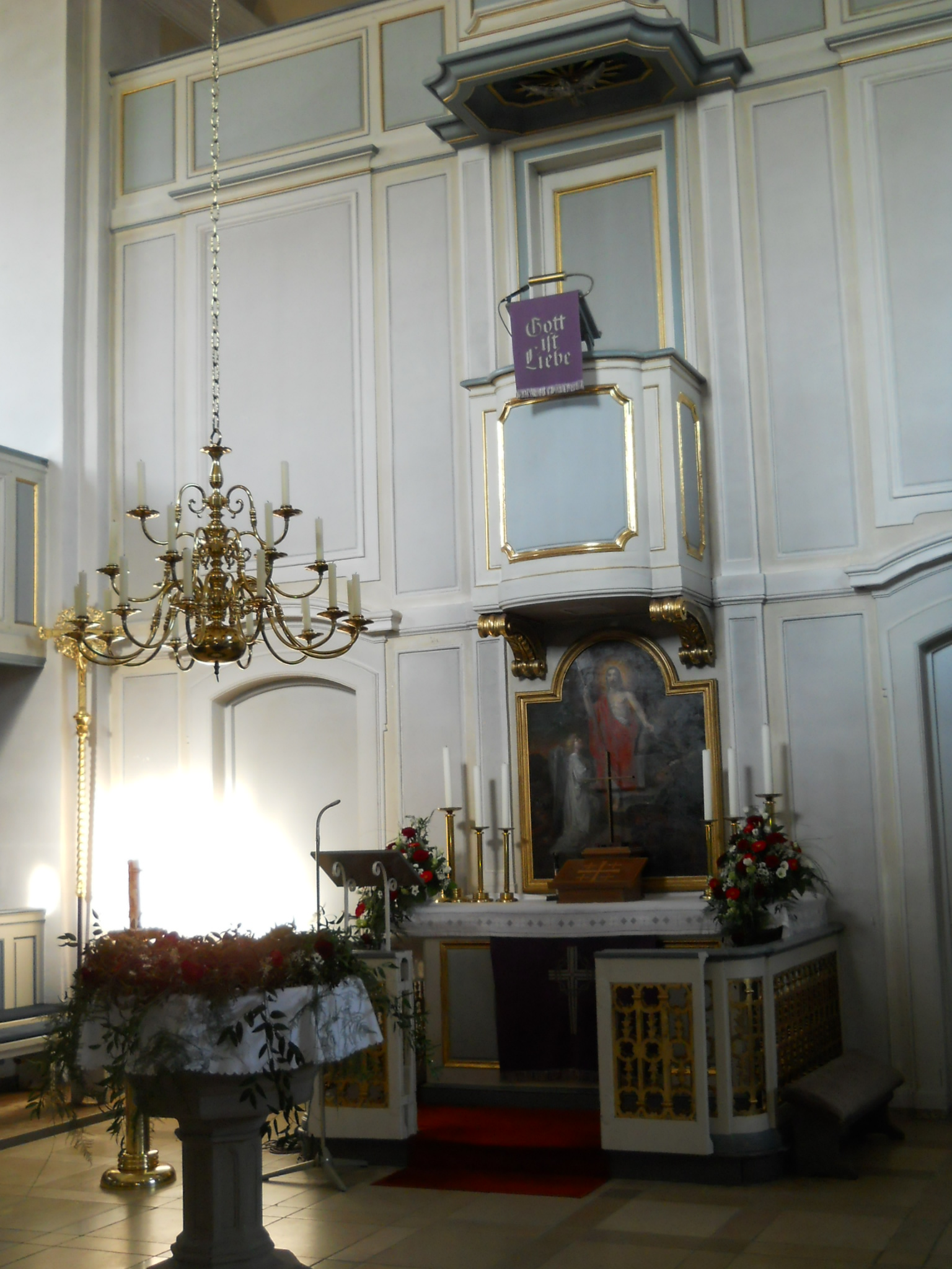 Kanzelaltar des Markgrafenstils in der Kirche von Wald, Ortsteil von Gunzenhausen im Landkreis Weißenburg-Gunzenhausen, Bayern